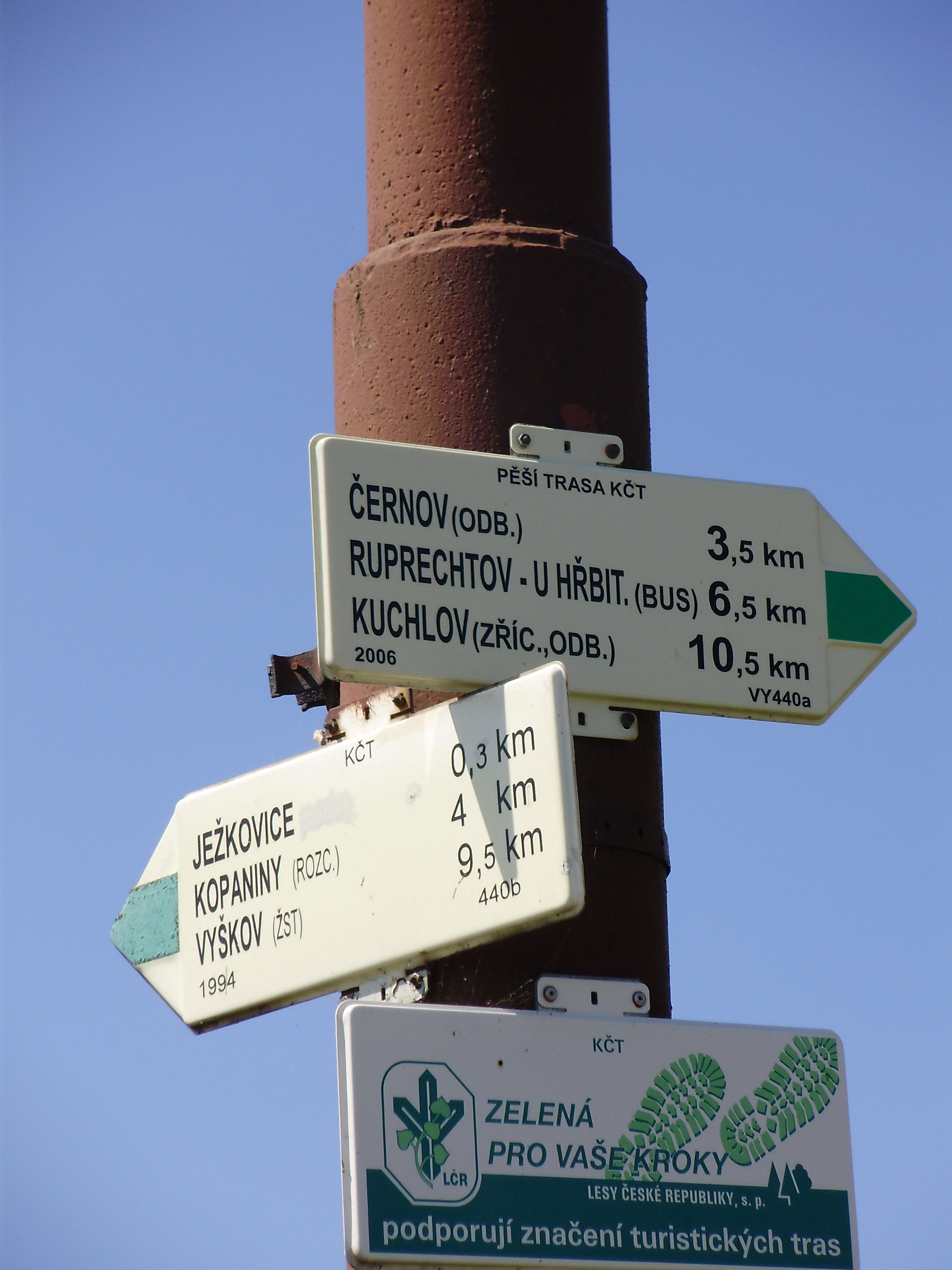 Ježkovice - rozcestník v obci (Vyškov- Czech republic)